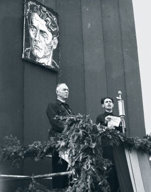 Sub portretul lui Corneliu Zelea Codreanu, fondatorul Miscarii Legionare, succesorul său, Horia Sima, vorbește la manifestiația din octombrie 1940, în prezența generalului Ion Antonescu